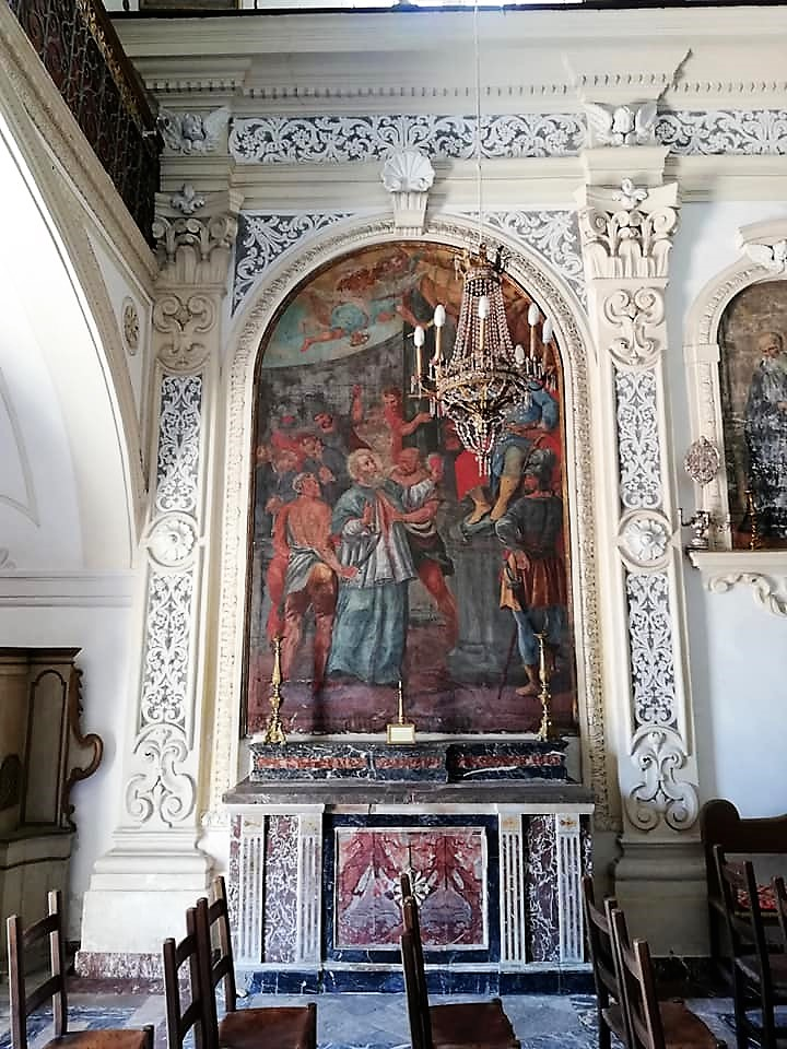 Cappella di San Procopio. Altare di San Procopio. Sull'altare compreso fra lesene decorate è custodito il dipinto Martirio di San Procopio, opera di Ludovico Suirech.